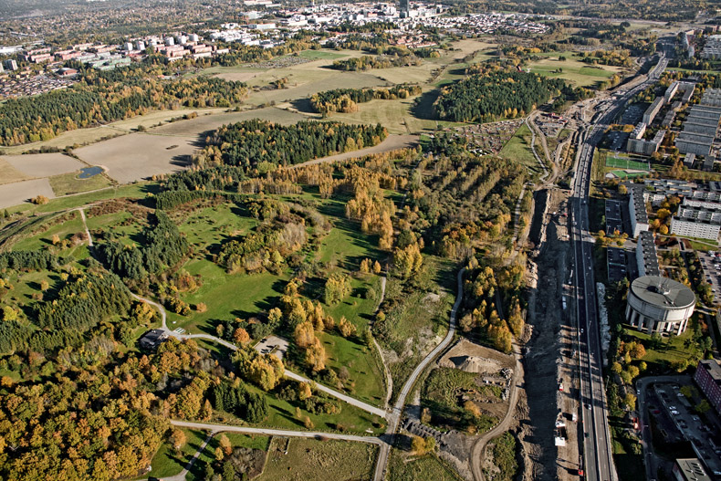 Järvafältet till vänster, intill E18. Hjulsta vattentorn nere till höger i bild.